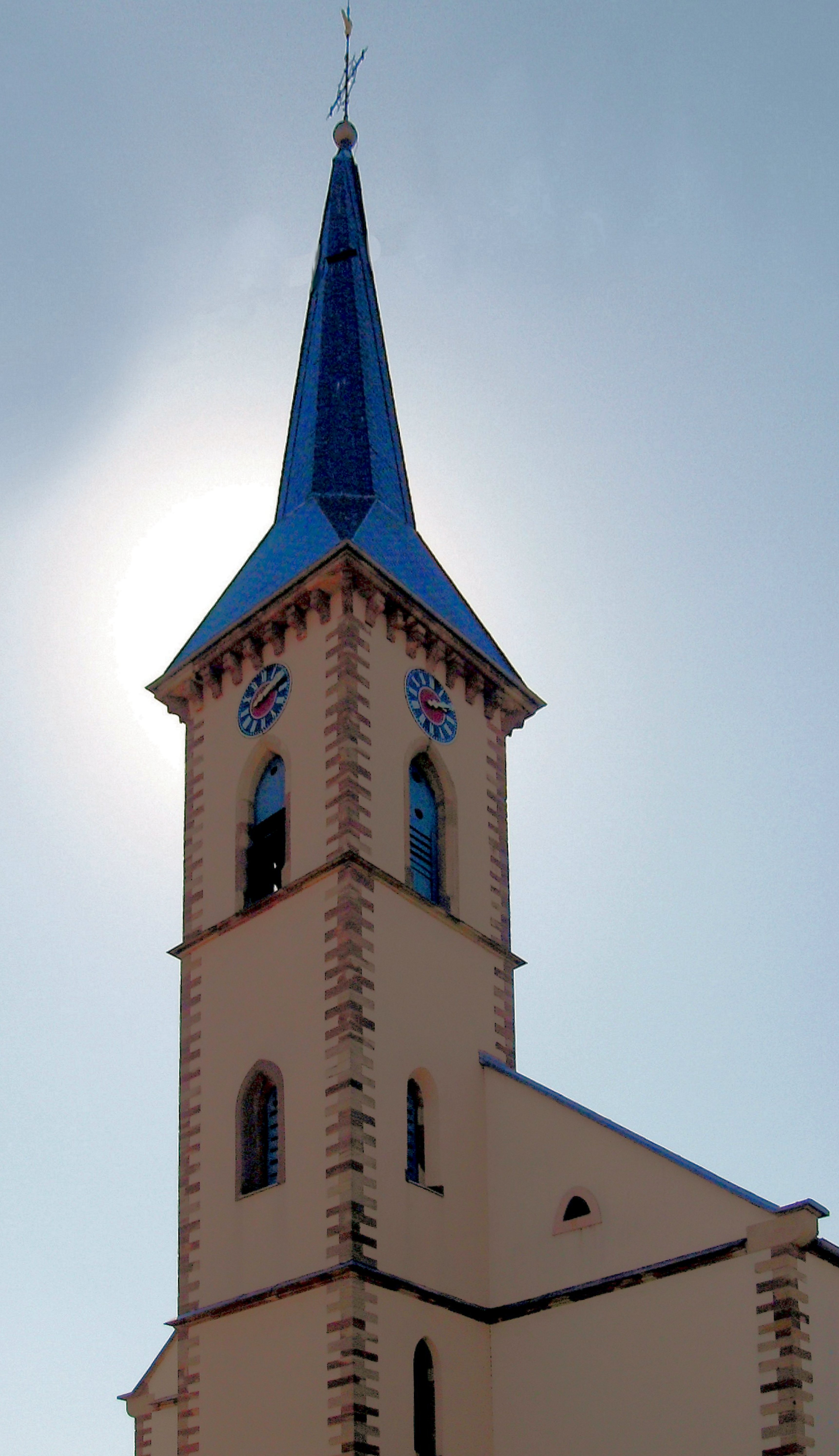 L'église Saint-Barthélem à Leutenheim